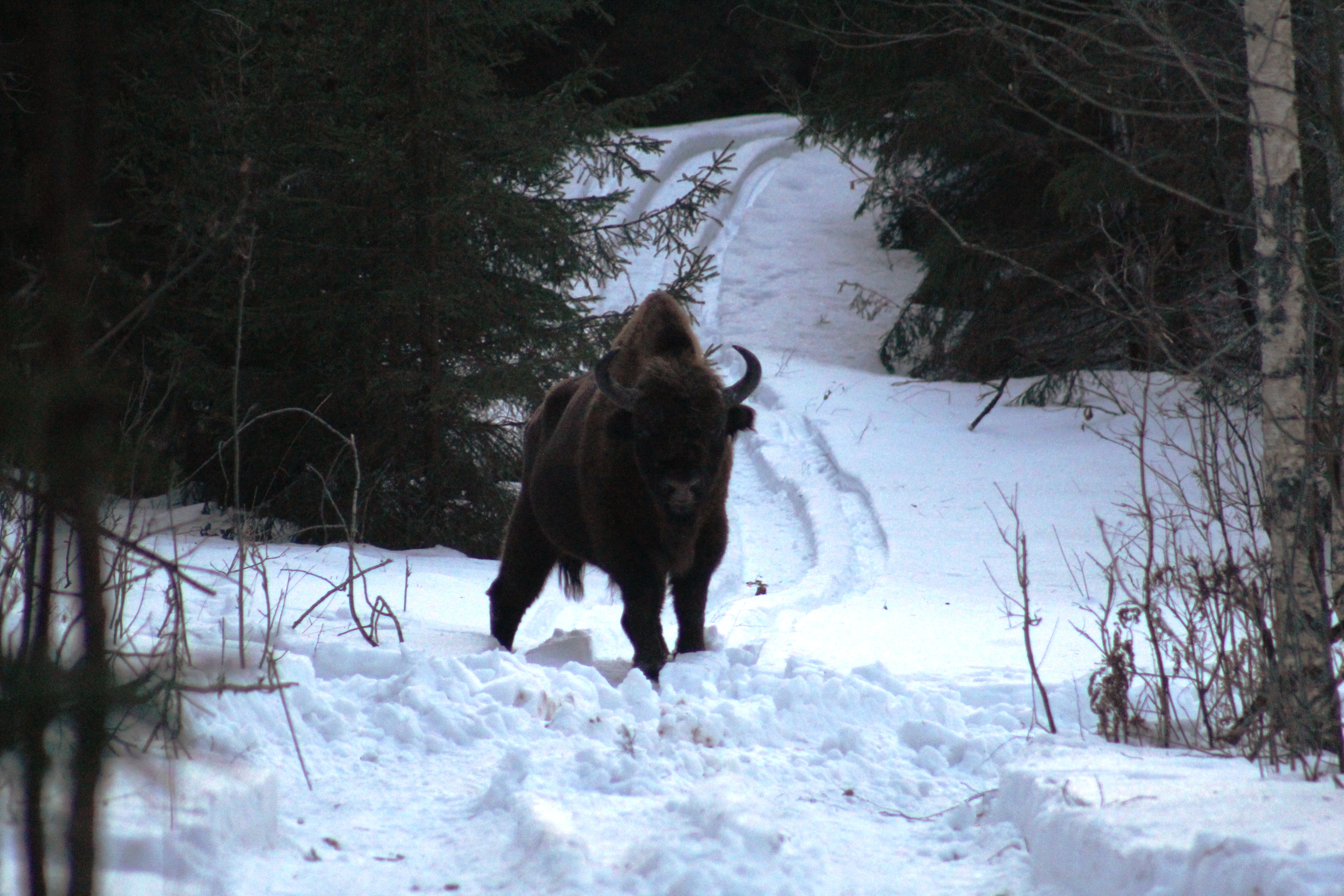 Вольная популяция европейского зубра. Снимок сделан в марте 2015 года